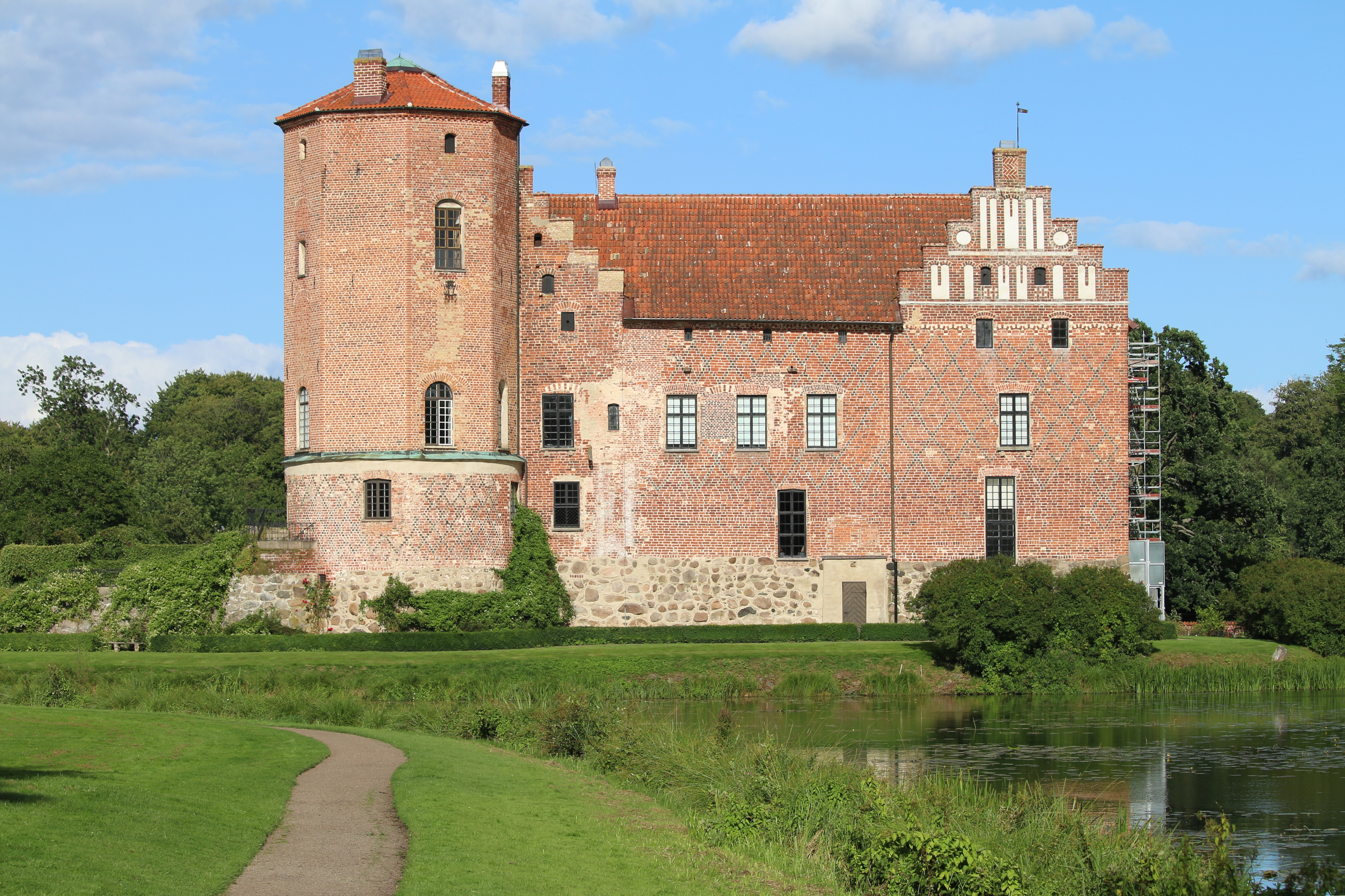 Torups slott 2017